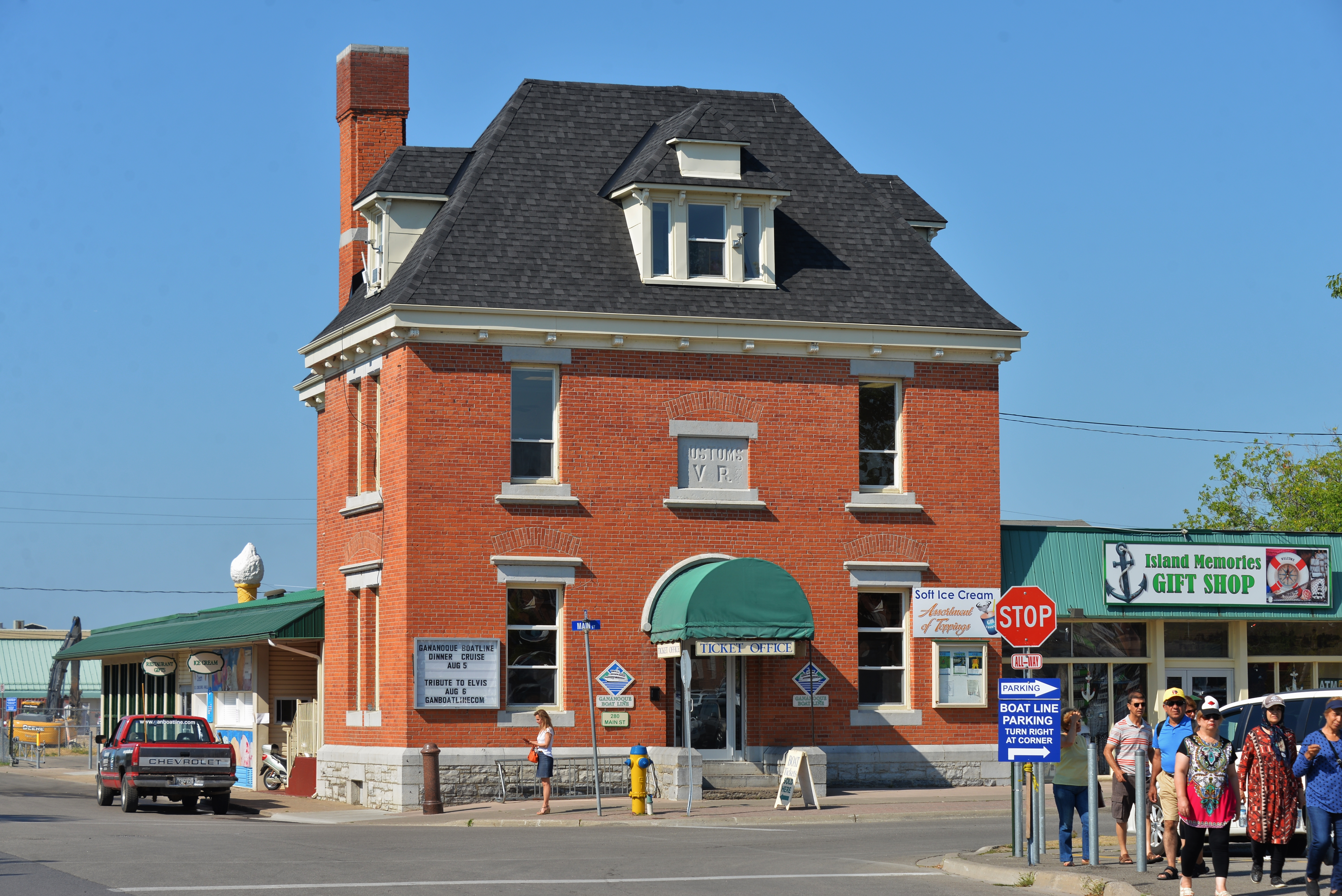 Білетні каси і сувенірна крамничка Туристичної лінії "1000 островів" у будинку колишньої митниці в Ґананокве